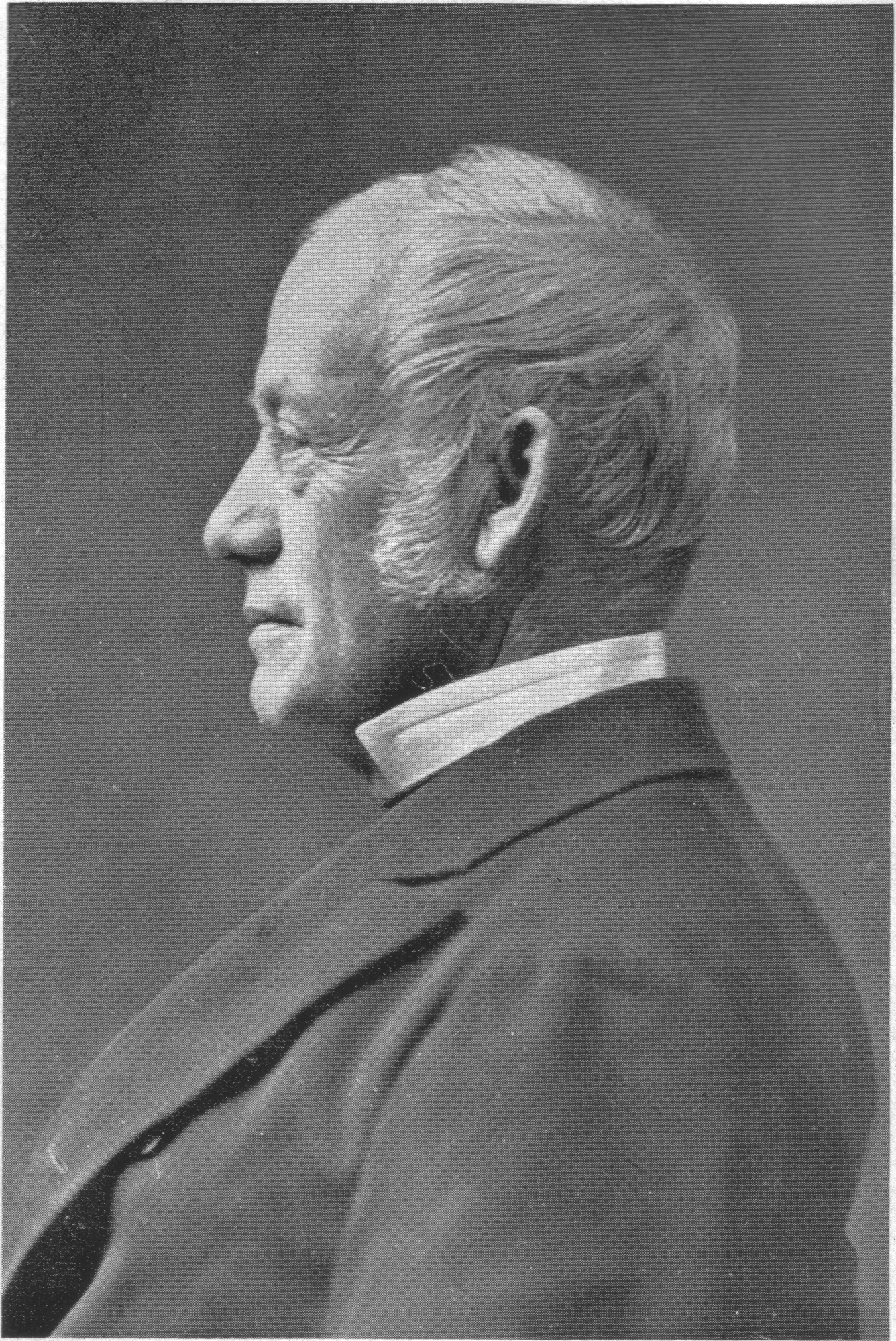 Frederik Stang i profil.